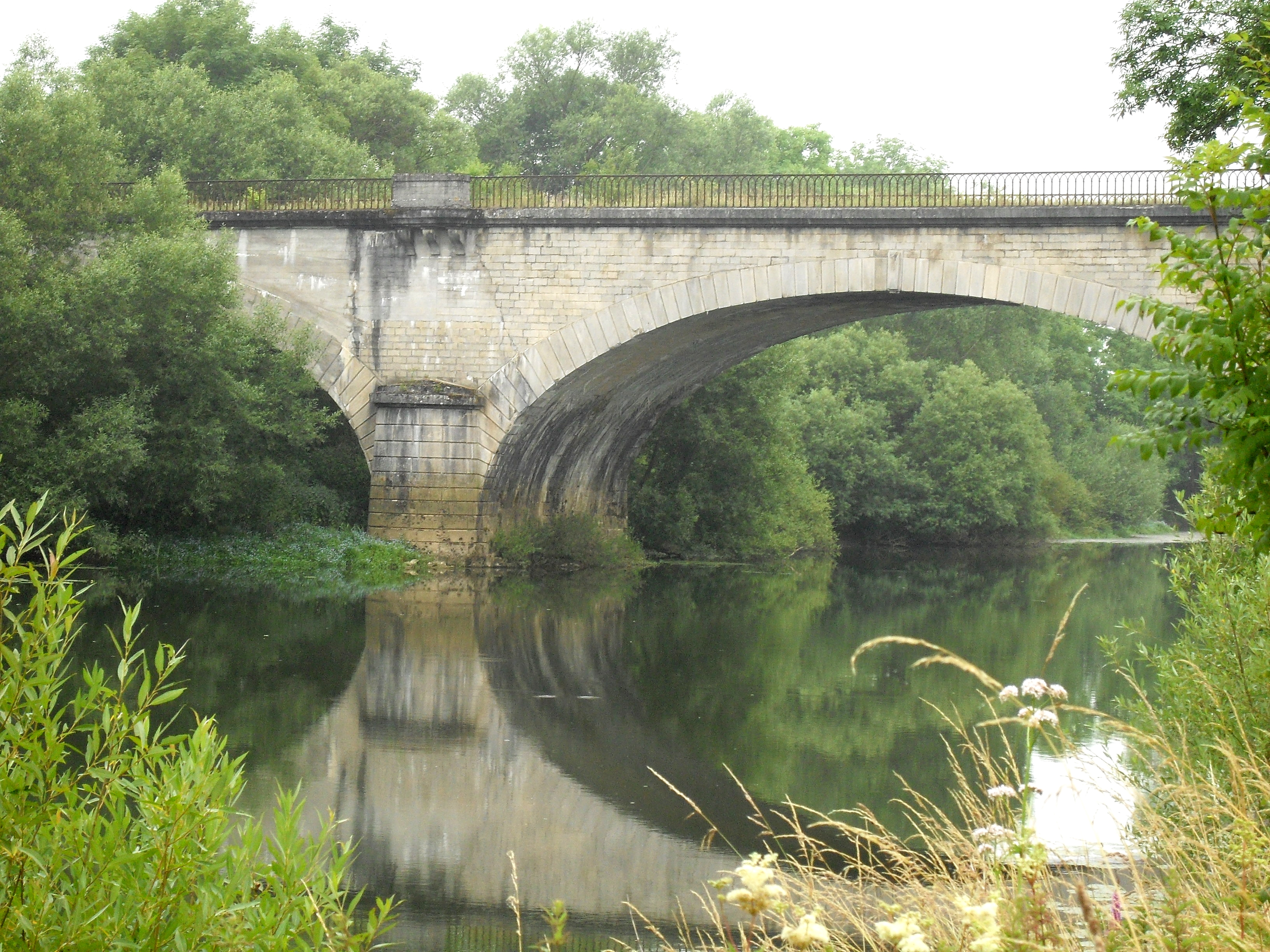 Saint-Germain-sur-Meuse Meuse (55) - Le Viaduc du chemin de fer sur la Meuse. Cette portion de la ligne de chemin de fer Neufchâteau - Pagny-sur-Meuse est aujourd'hui désaffectée. Cette ligne à double voie qui a nécessité la construction d'un certain nombre d'ouvrages d'art en pierre : ponts, viaducs, tunnels, n'a été utilisée qu'un siècle à peine, avant d'être abandonnée.